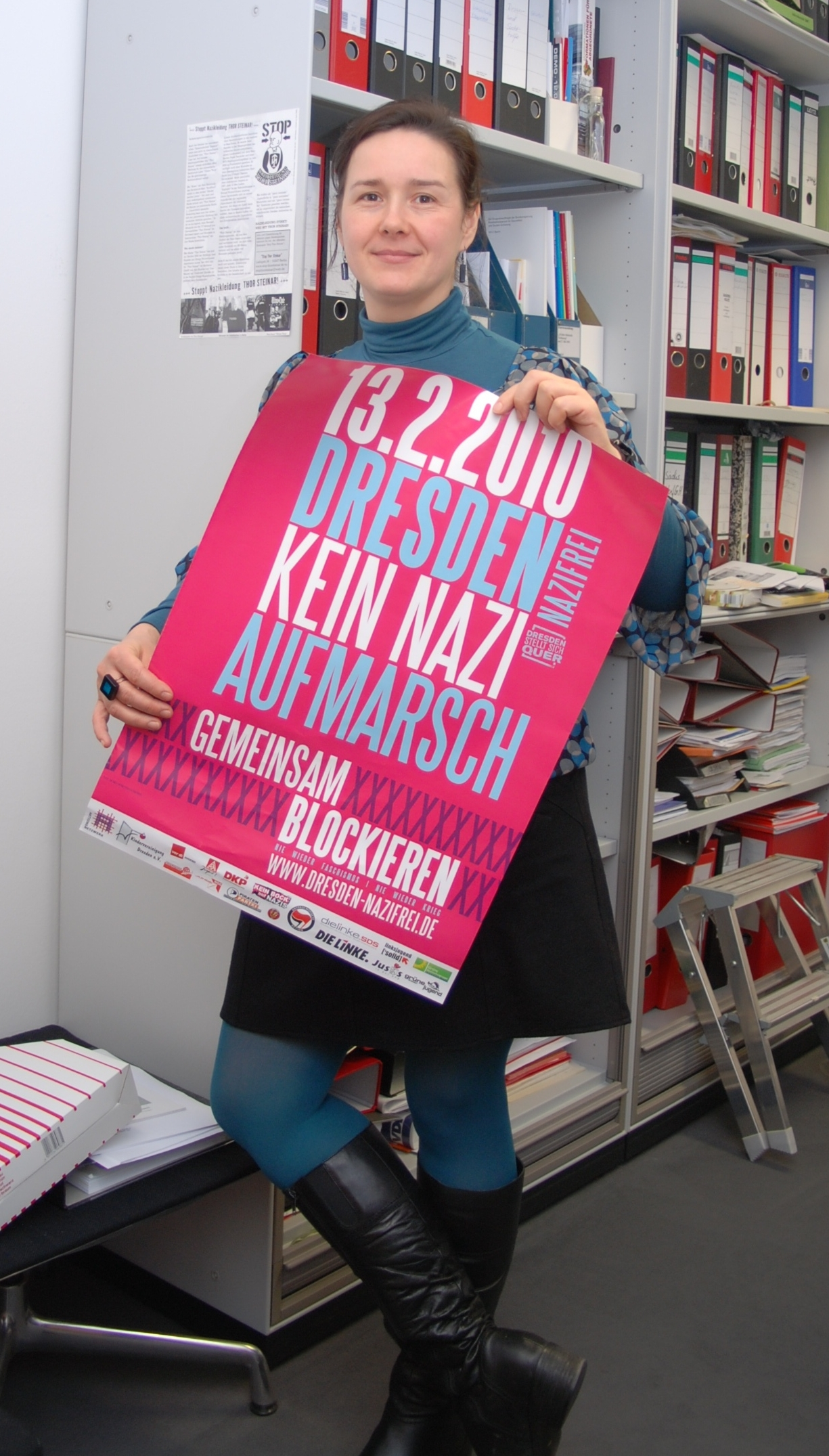 Heike Werner